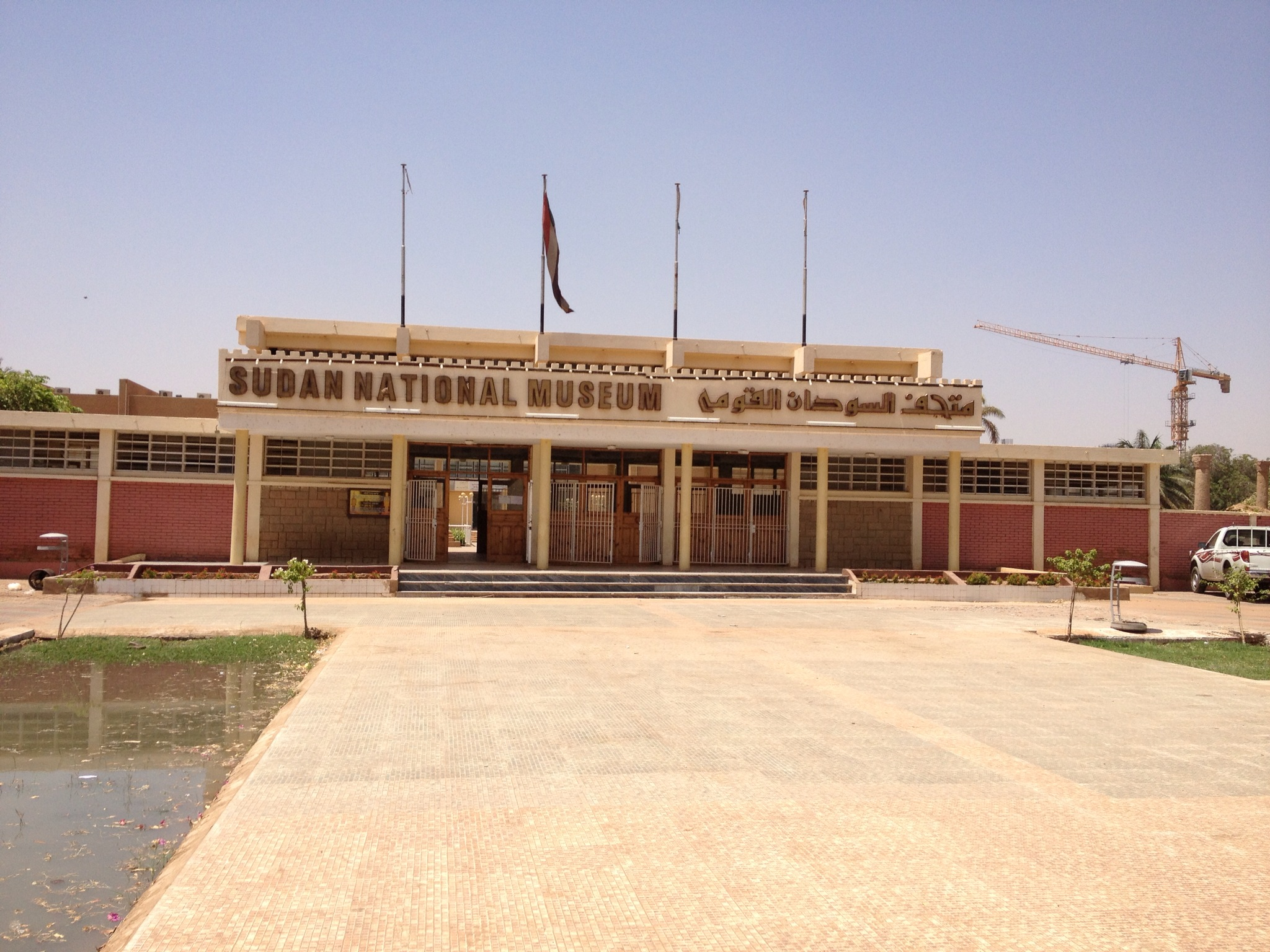 تصنيف:متاحف السودان تصنيف:معالم أثرية تصنيف:ثقافة سودانية تصنيف:متاحف في أفريقيا تصنيف:السياحة في السودان تصنيف:الخرطوم تصنيف:مبان ومنشآت في السودان